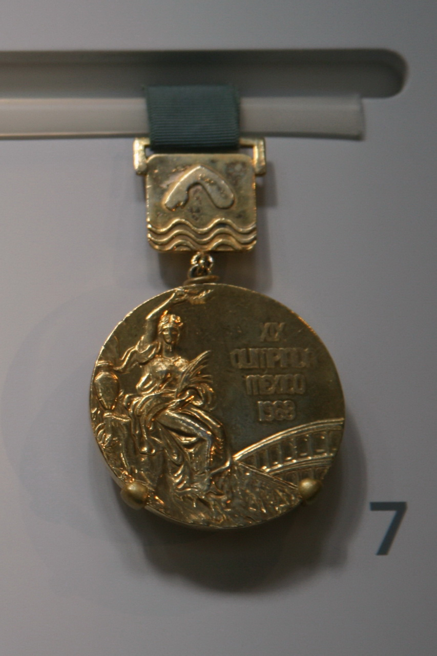 Medalla de oro de los Juegos Olímpicos de México 1968